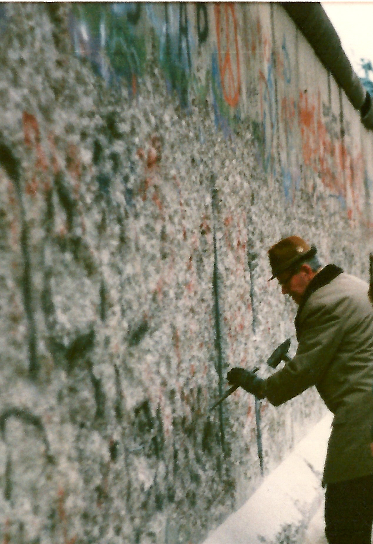 Mauerspecht zwischen Potsdamer Platz und Brandenburger Tor, Berlin November 1989